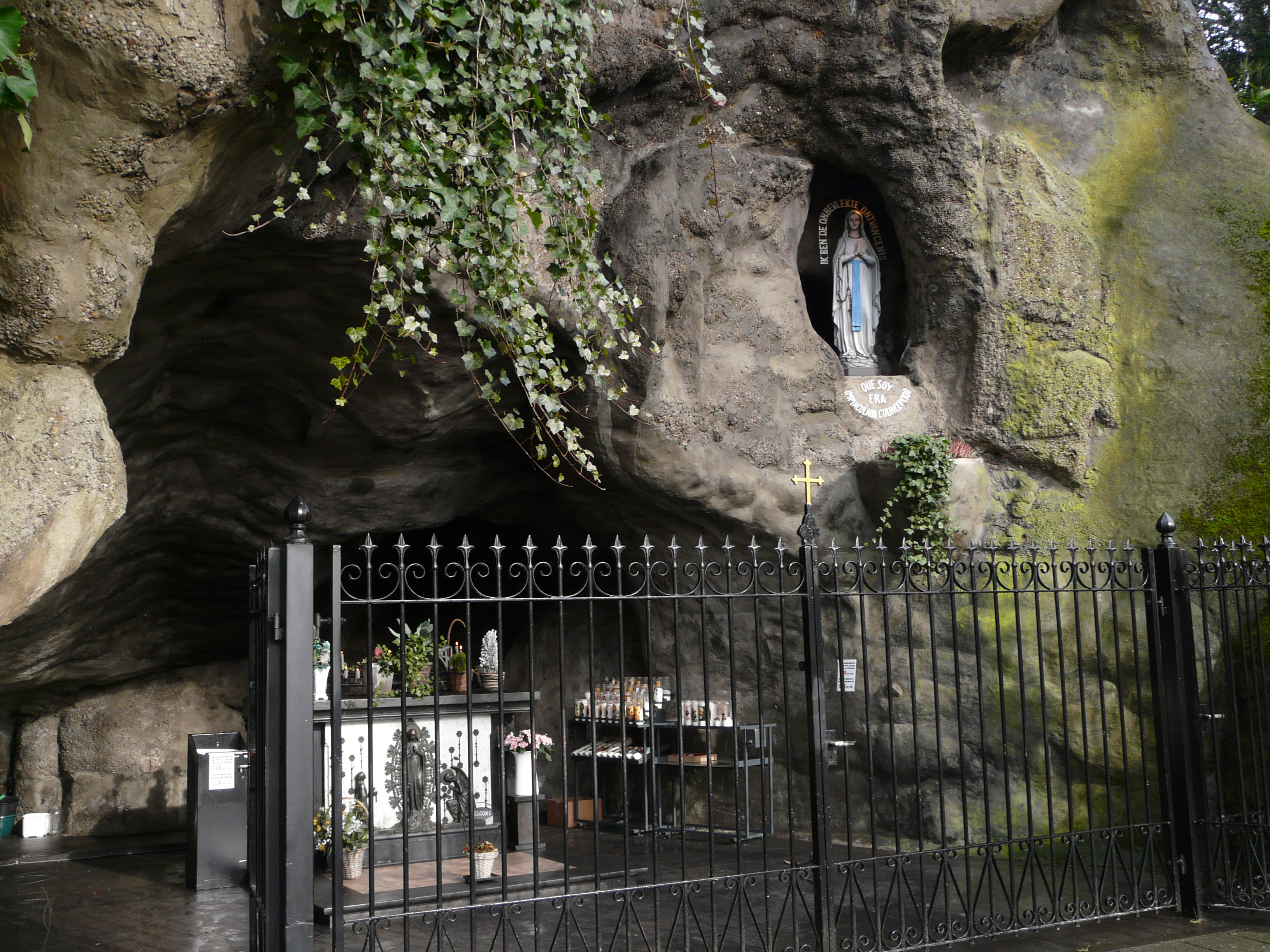 Zicht op een deel van de Lourdesgrot in St. Willebrord